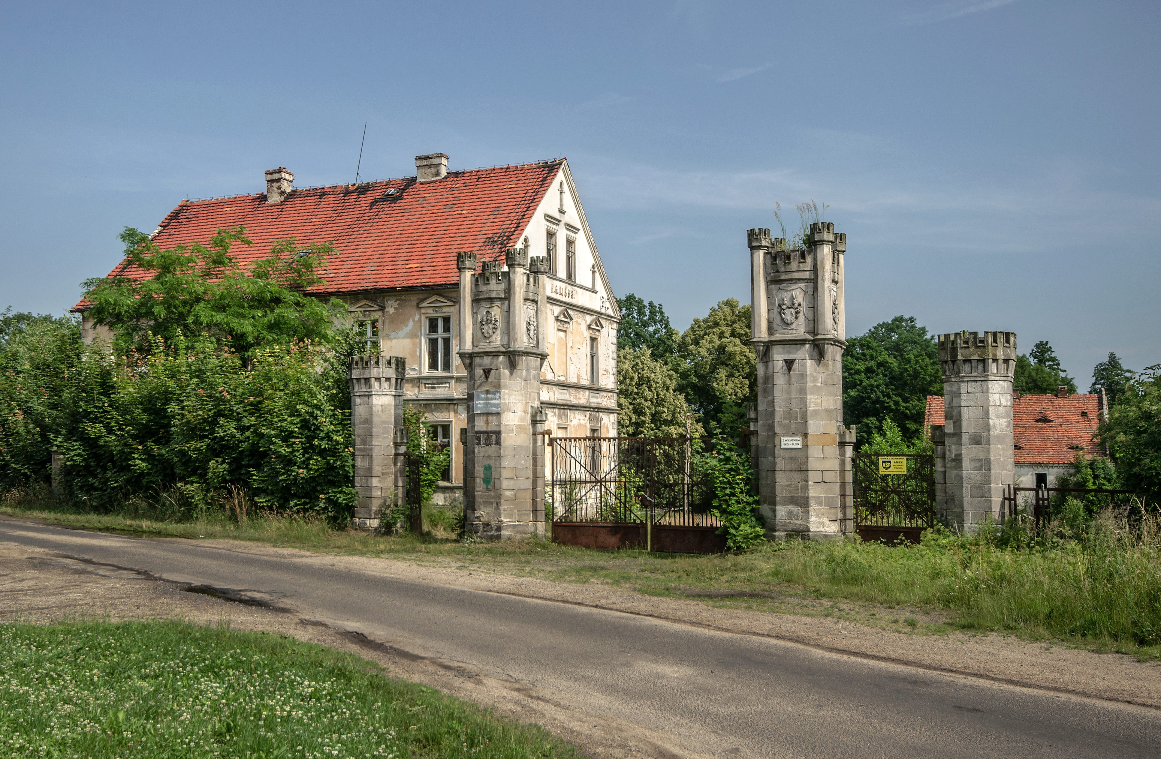 Modła - pozostałości bramy pałacowej.